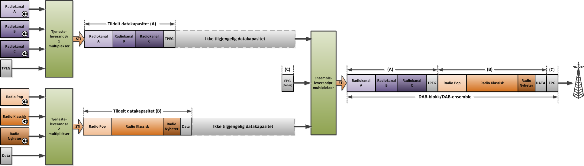 Eksempel på DAB multipleksing.